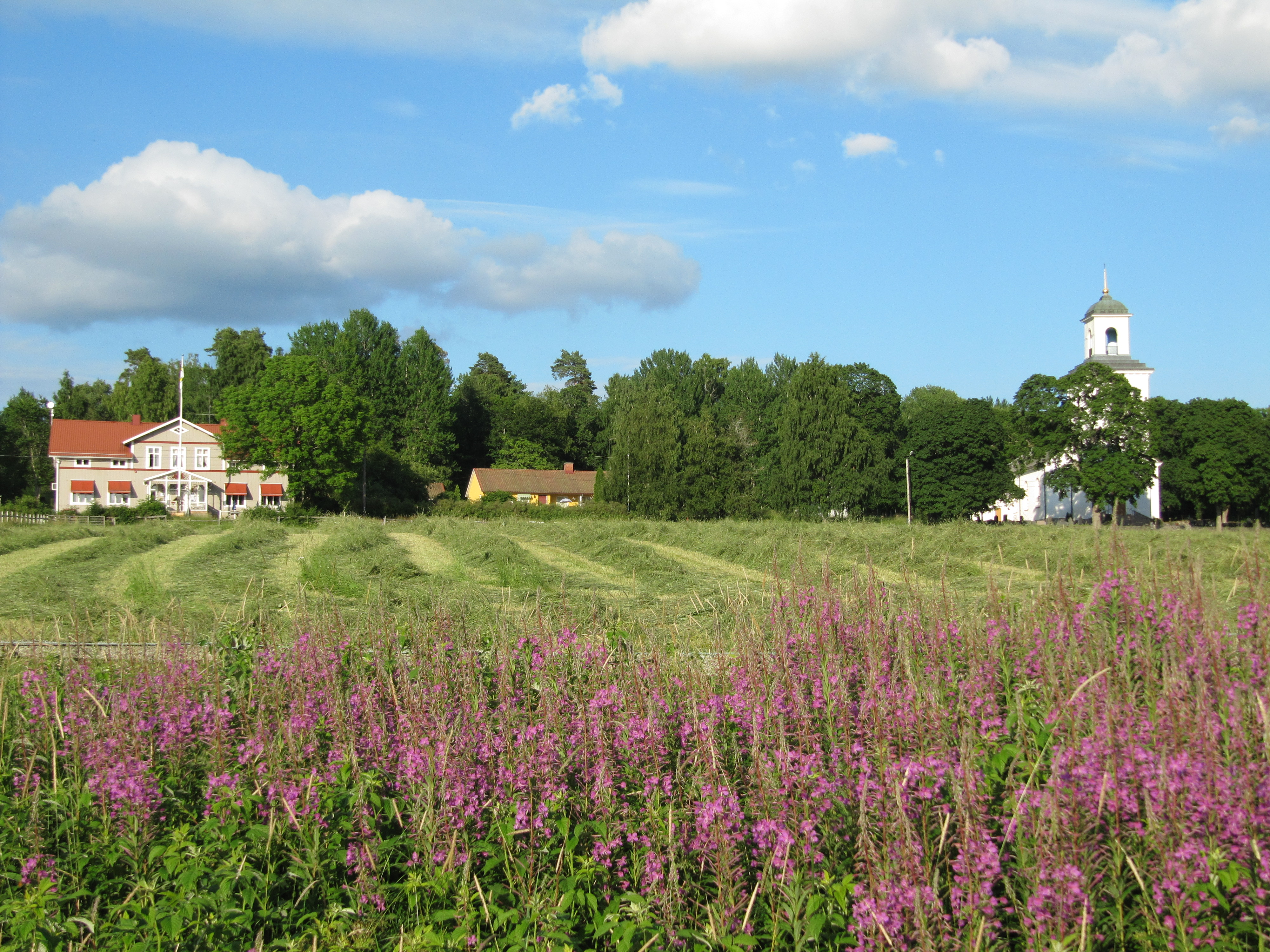 Asa kyrkby